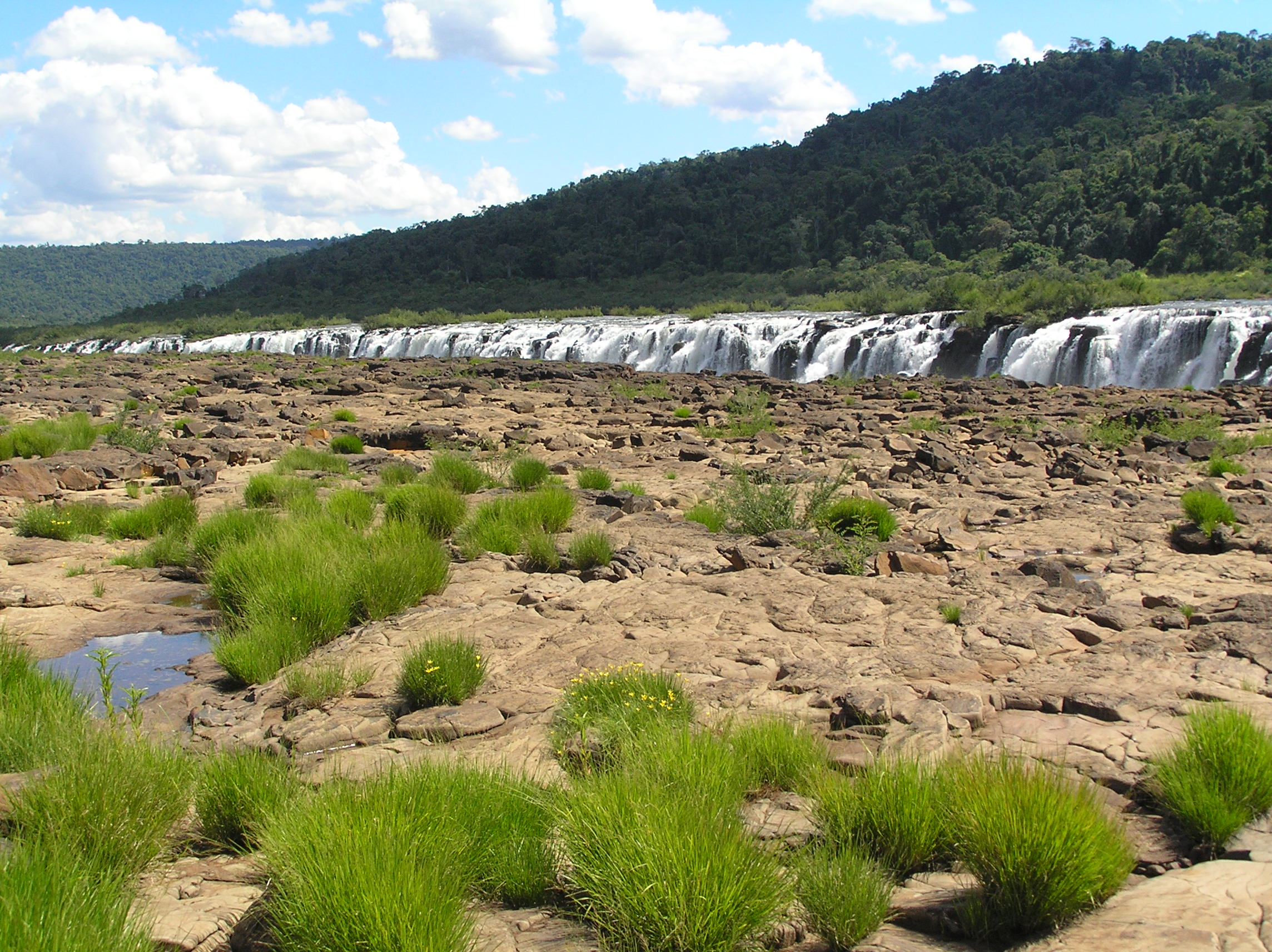 Entre pedras e água, as belezas do salto do Yucumã. Parque do Turvo, Derrubadas - RS